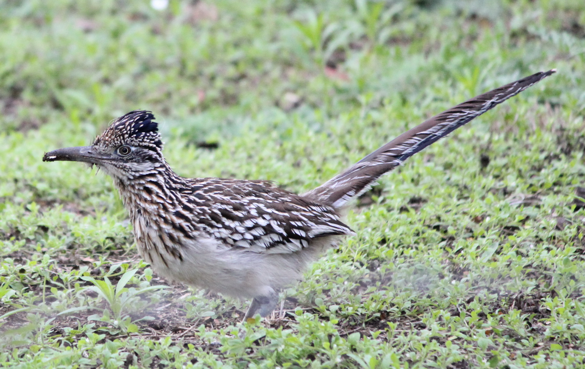 Correcaminos en Ciudad Victoria, Tamaulipas México